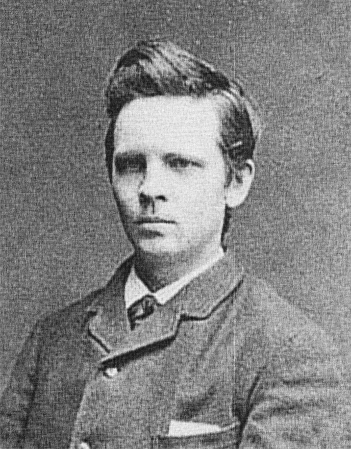 Retrat del matemàtic danès Chistian Juel (1855-1935)